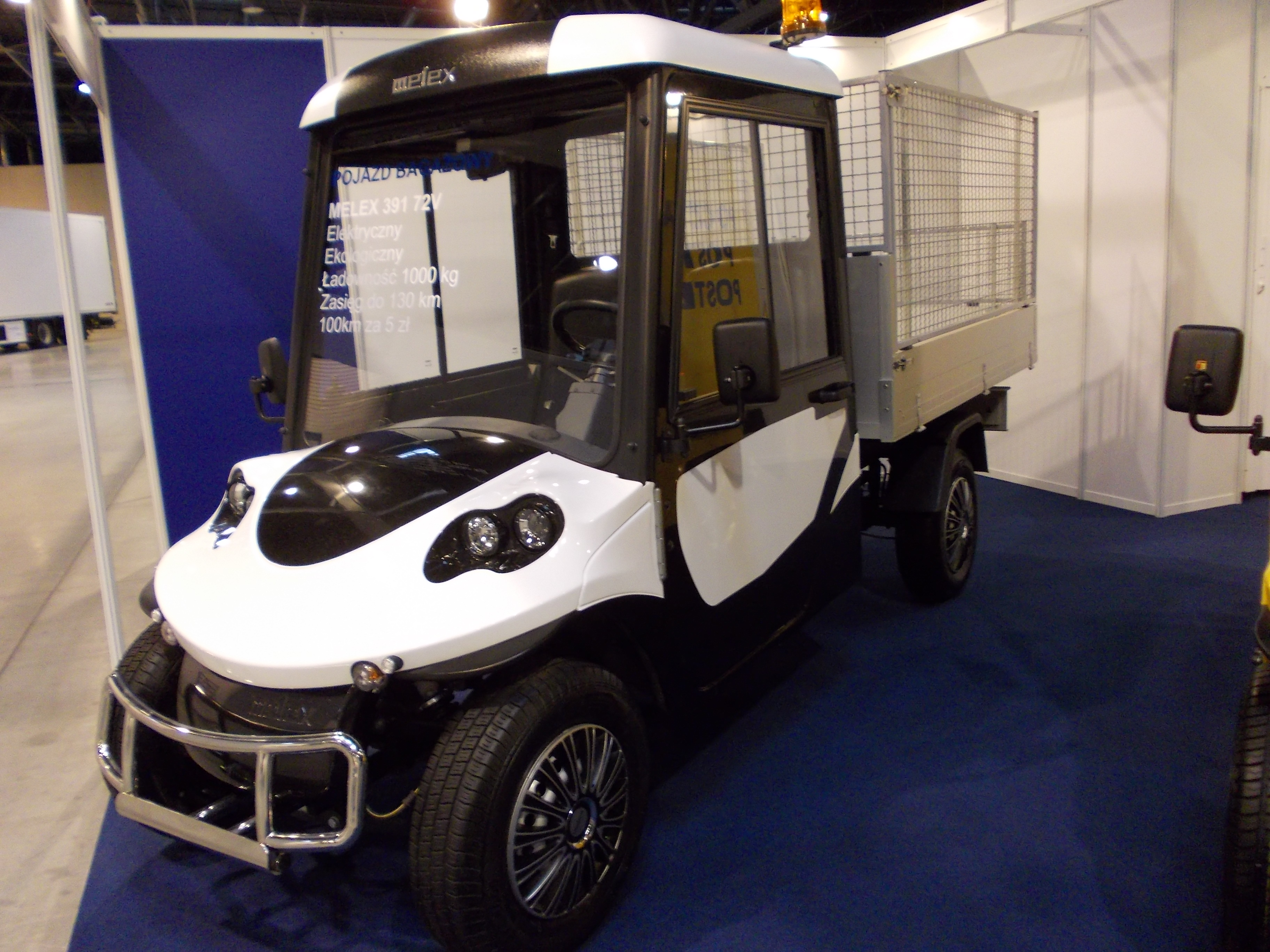 Melex 391 72V bagażowy podczas SilesiaKOMUNIKACJA 2014 w Sosnowcu.